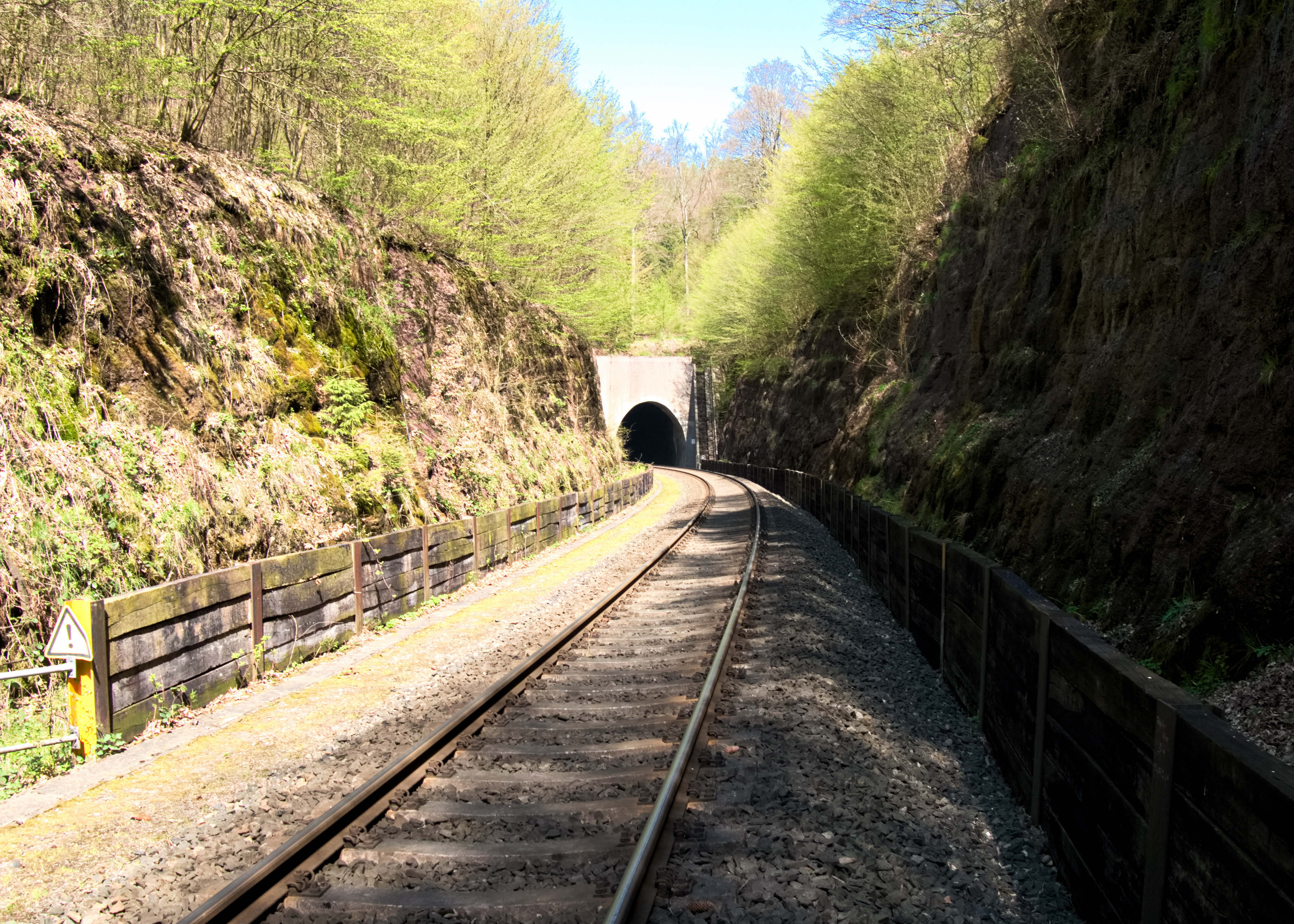 Blick auf das Südportal des Förthaer Eisenbahntunnels.